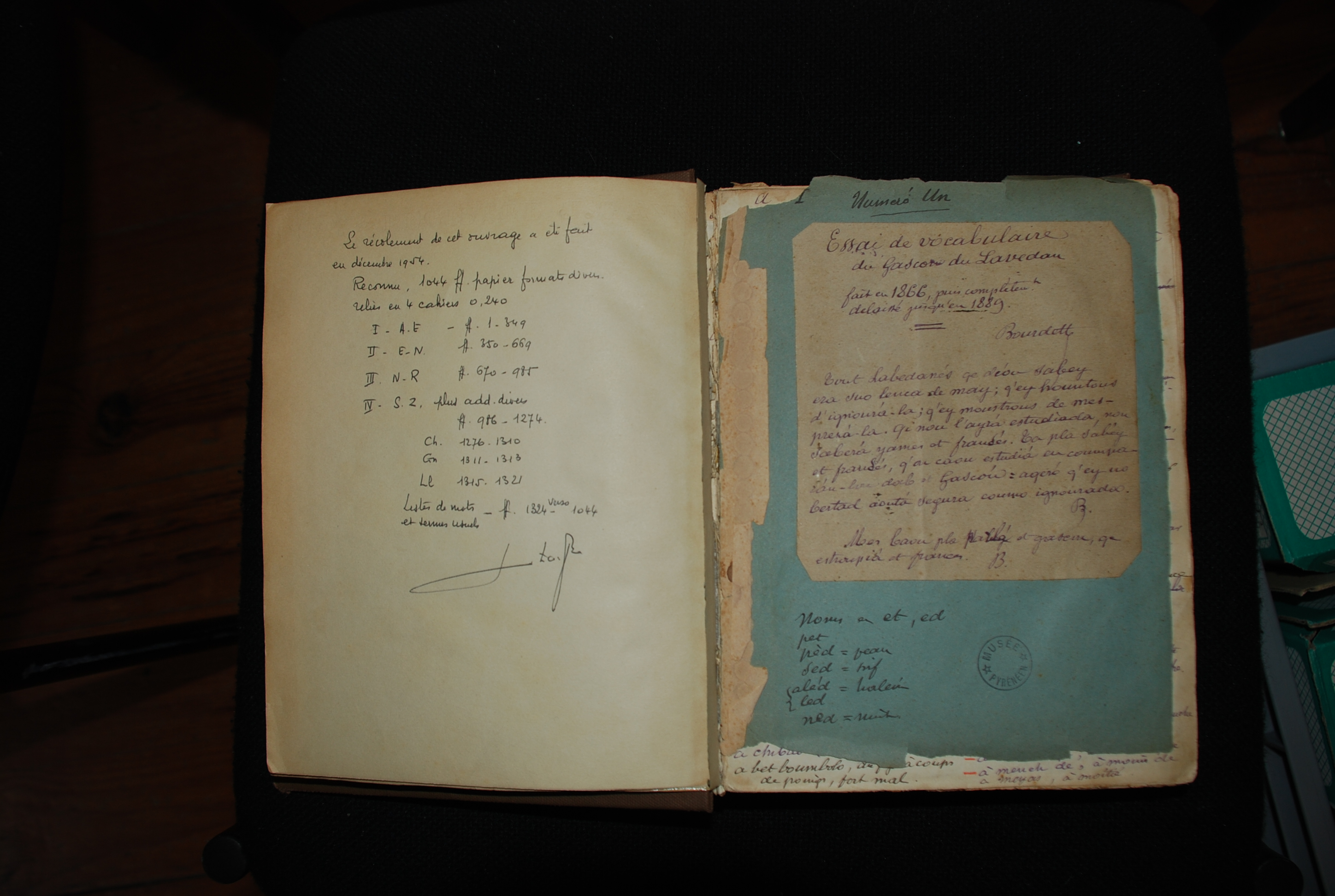 Introduction écrite par Jean Bourdette pour son dictionnaire Essai du vocabulaire du gascon de Lavedan conservé au Musée pyrénéen, Château fort de Lourdes, France